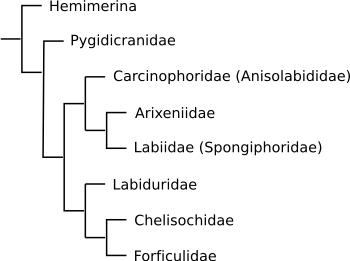 Ohrwurm: Phylogenie